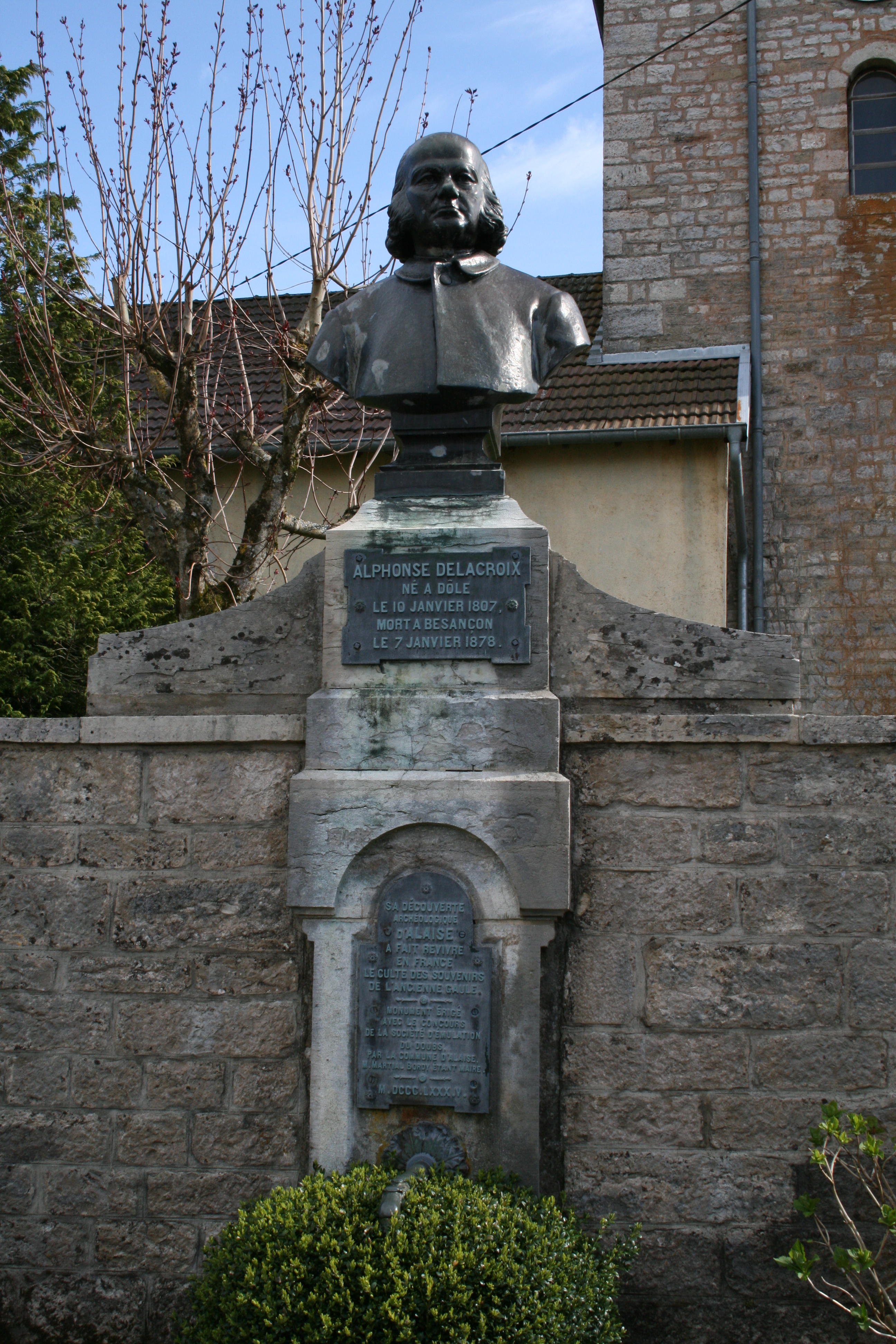 Alphonse Voisin-Delacroix, Monument à Alphonse Delacroix, 1885, Alaise (Doubs).